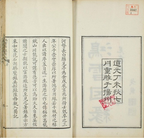 清道光年版 鴻雪因緣圖記